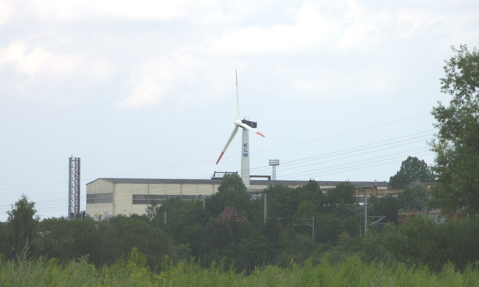 KGW Schweriner Maschinenbau GmbH